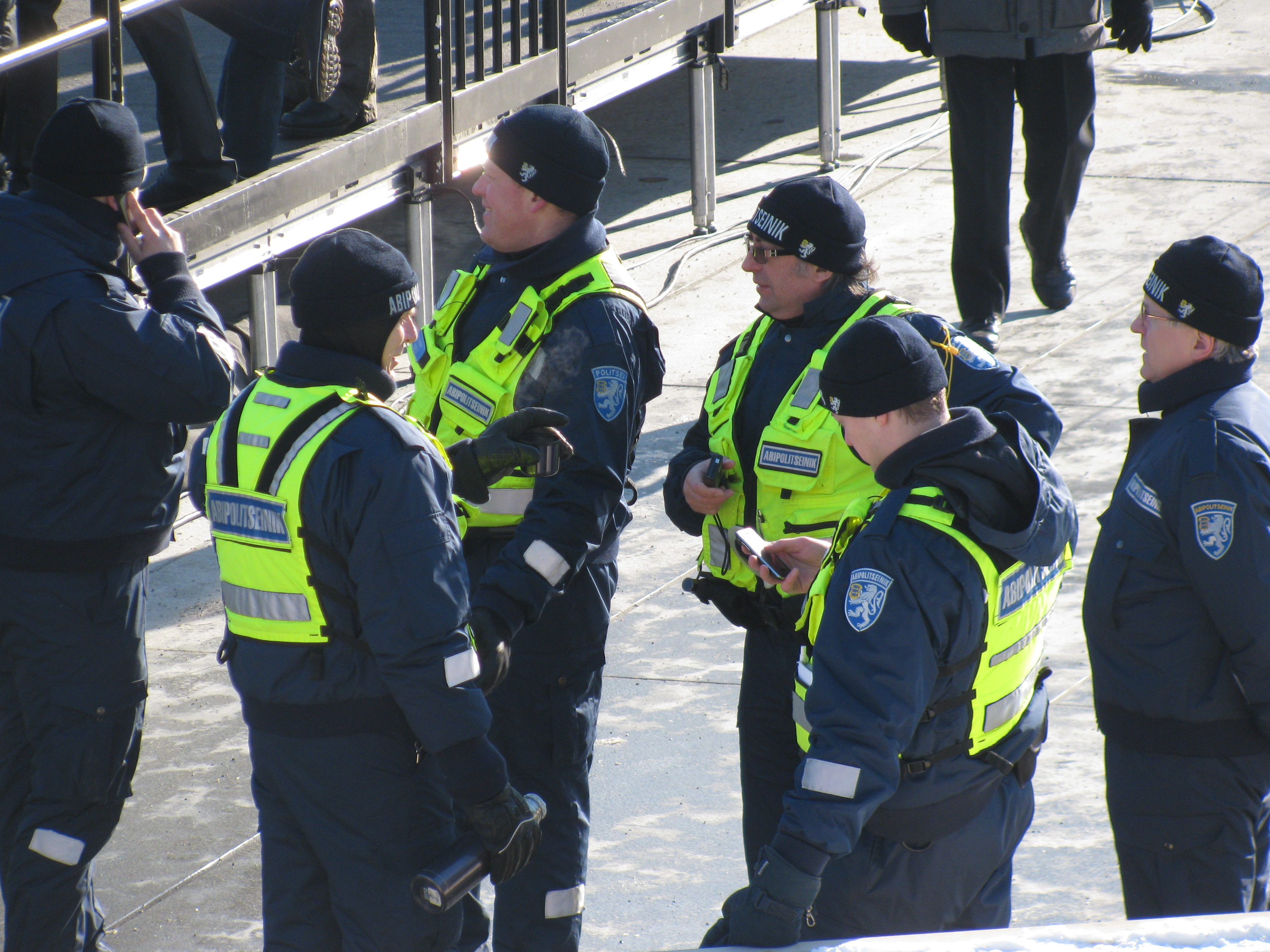 Abipolitseinikud Vabariigi aastapäeva paraadi valvamas